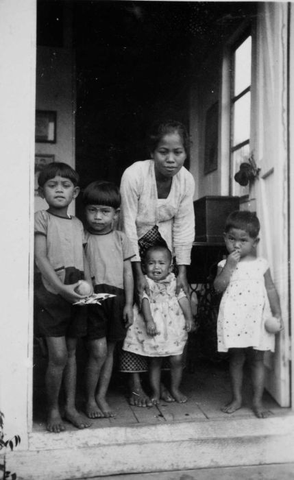 Foto. Portret van een baboe met kinderen in de deuropening van een huis voor Europeanen op Aek na Oeli